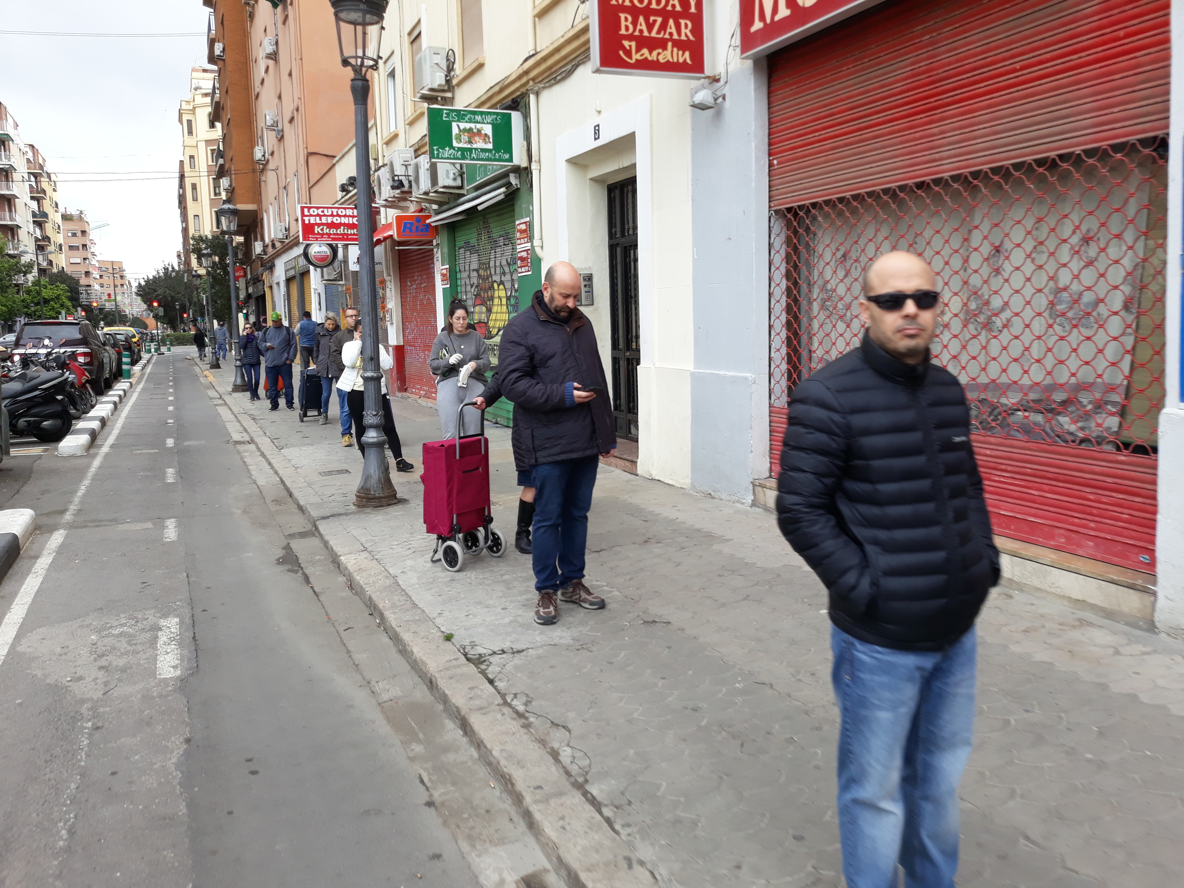 2020-03-Detalls i conseqüències del COVID-19 al País Valencià